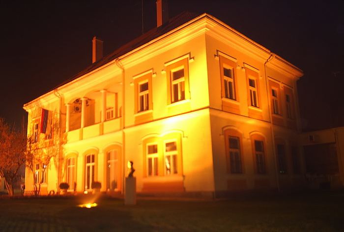 Sabacka biblioteka